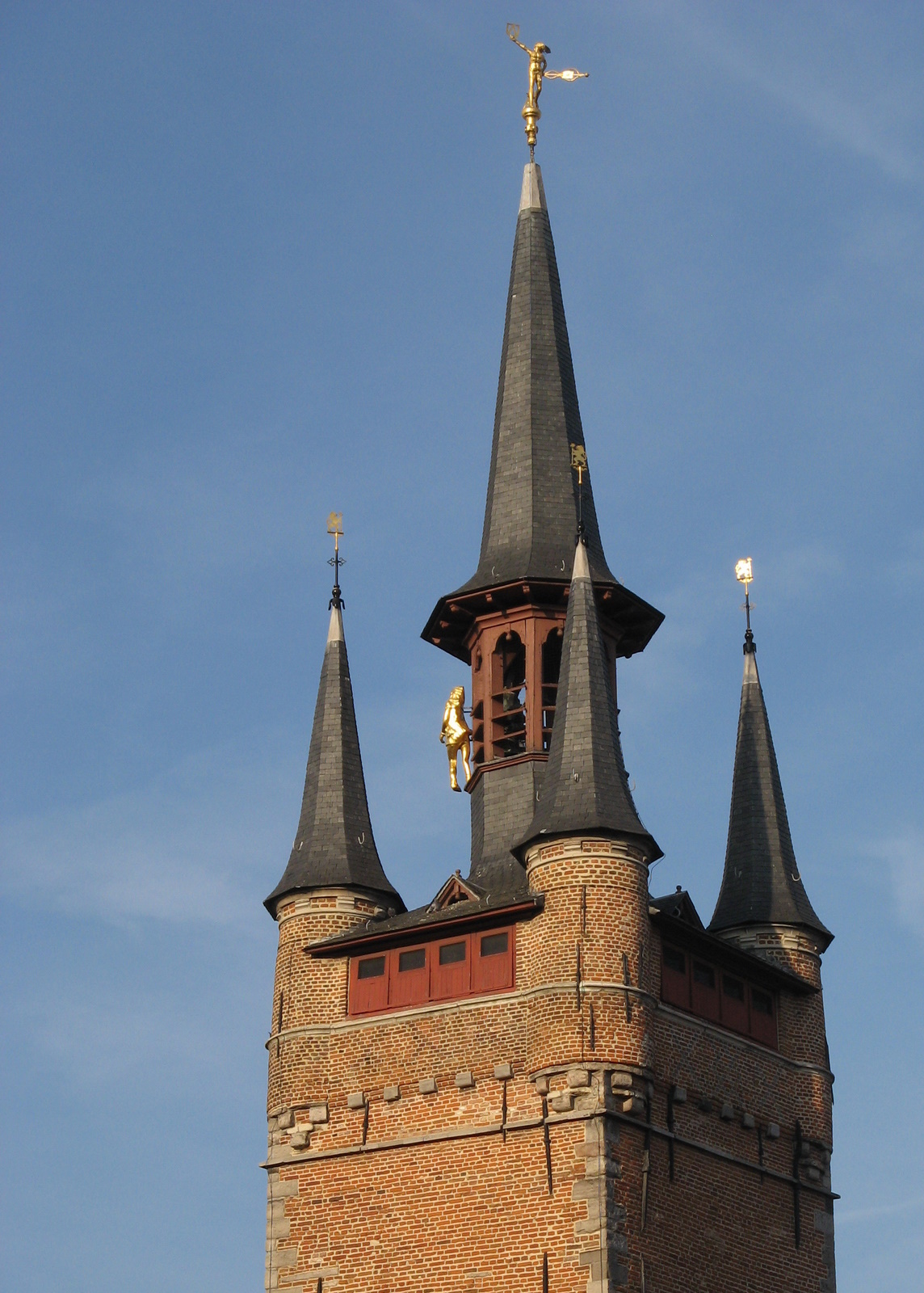 Kortrijk